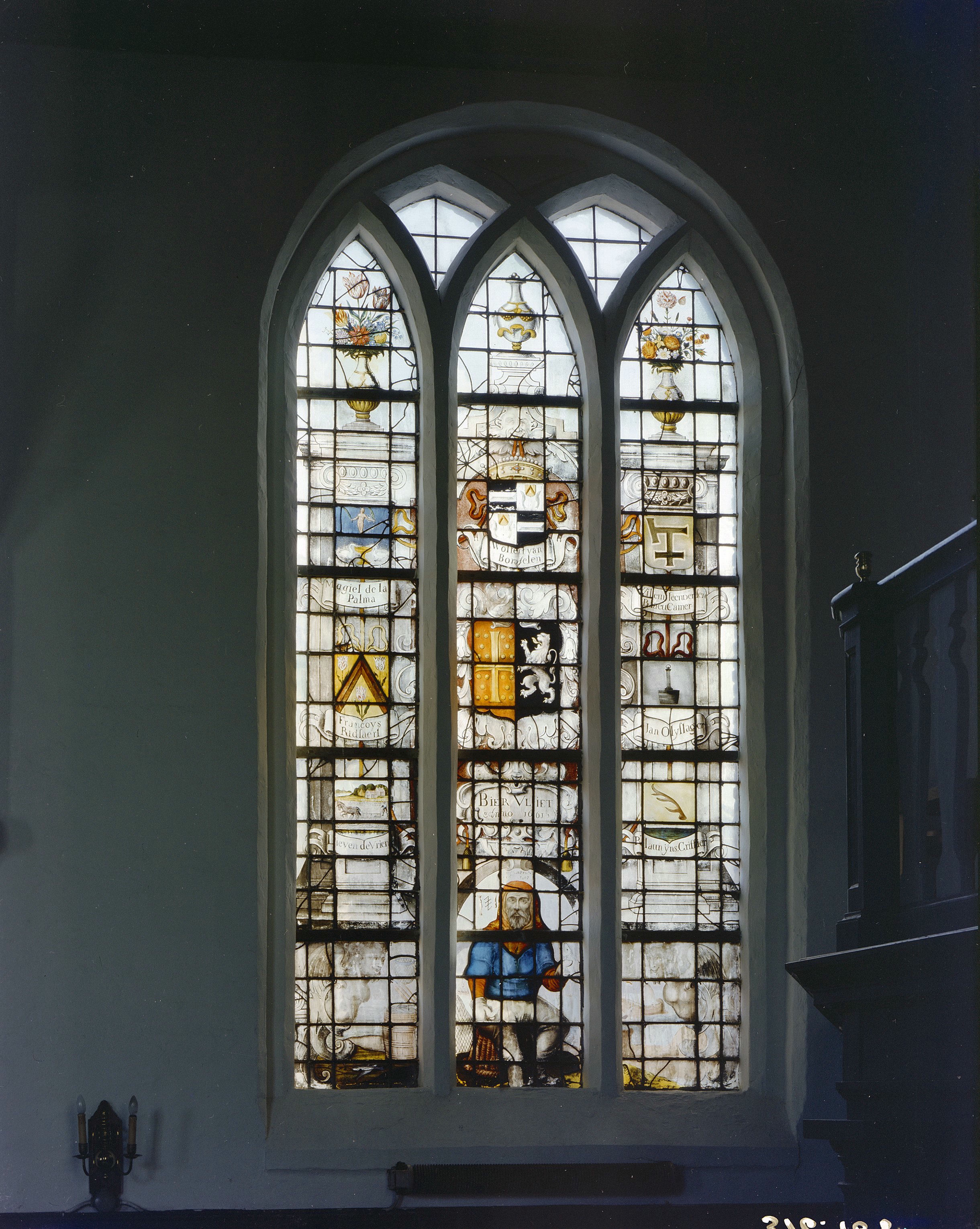 Nederlands Hervormde Kerk: INTERIEUR, GLAS IN LOODRAAM